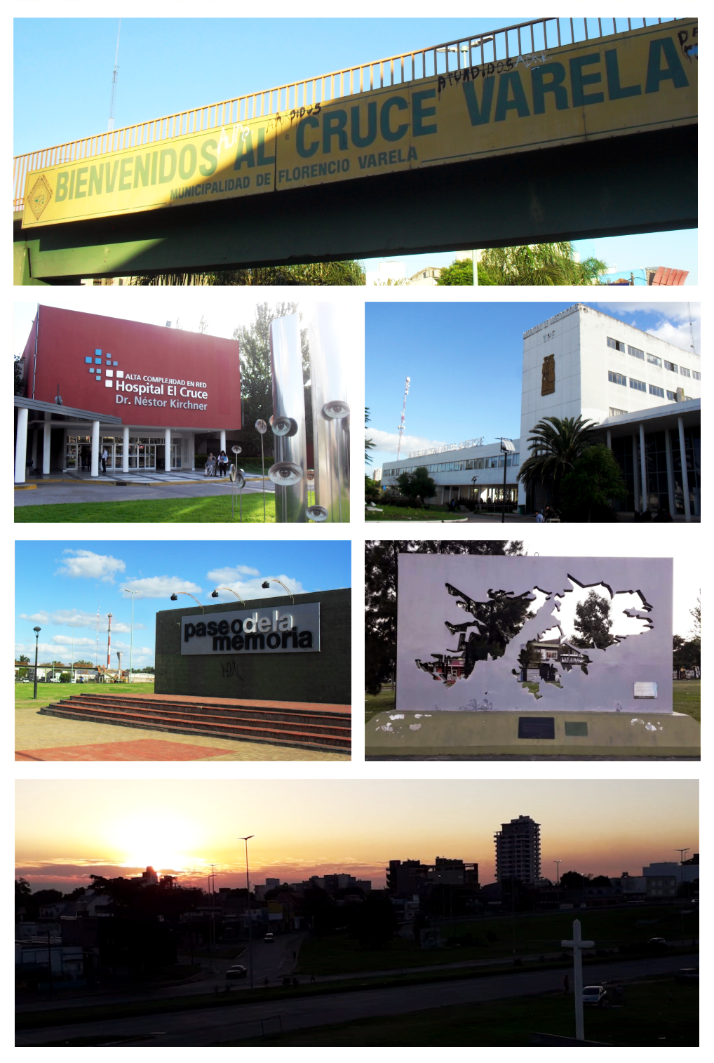 Cartel de bienvenida al Cruce Varela, Hospital de Alta Complejidad El Cruce, Universidad Nacional Arturo Jauretche, Paseo de la Memoria, Monumento a los Caídos de Malvinas y atardecer en el Cruce Varela.